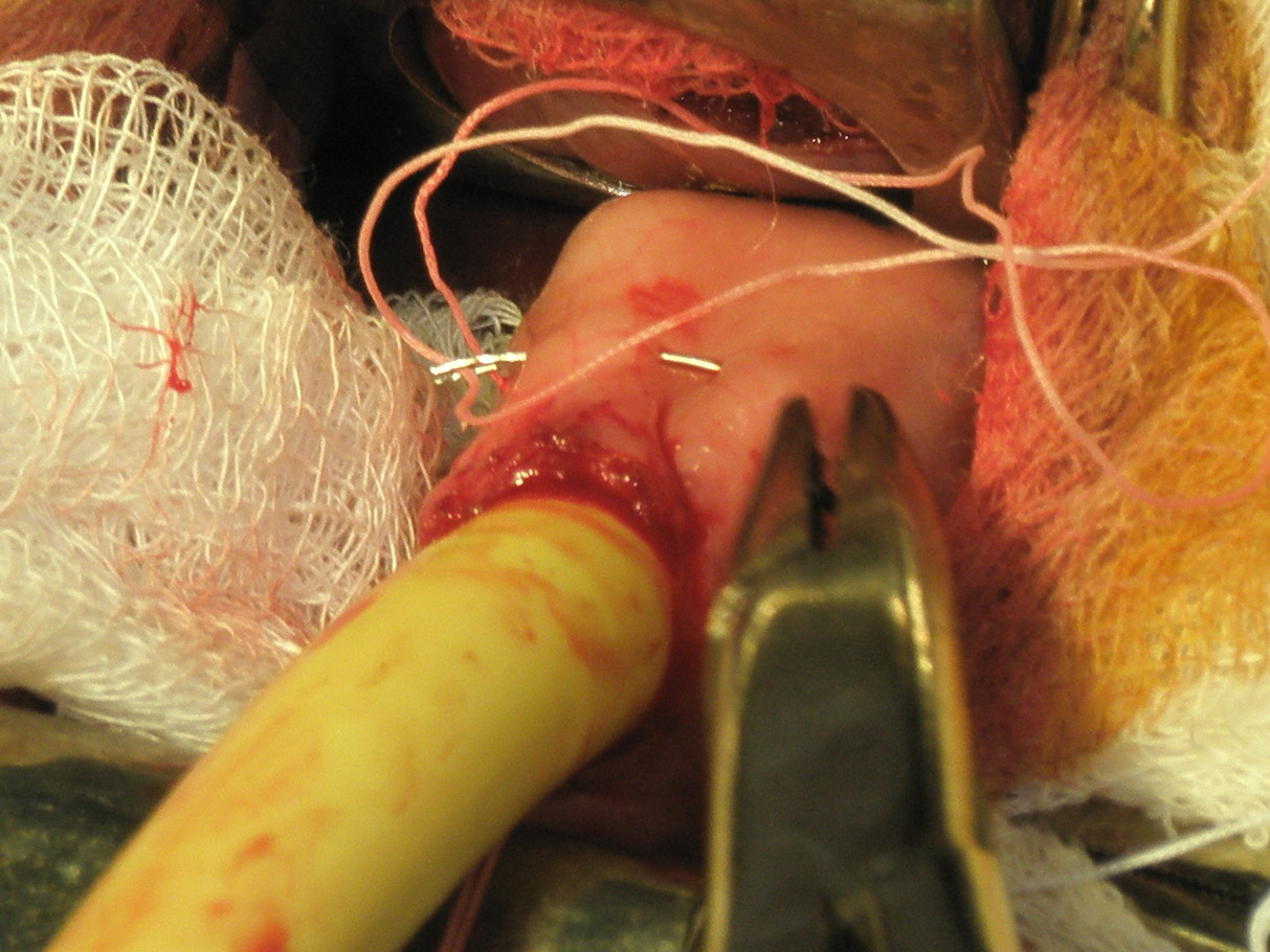 Гастростомия по Кадеру. Первый кисетный шов